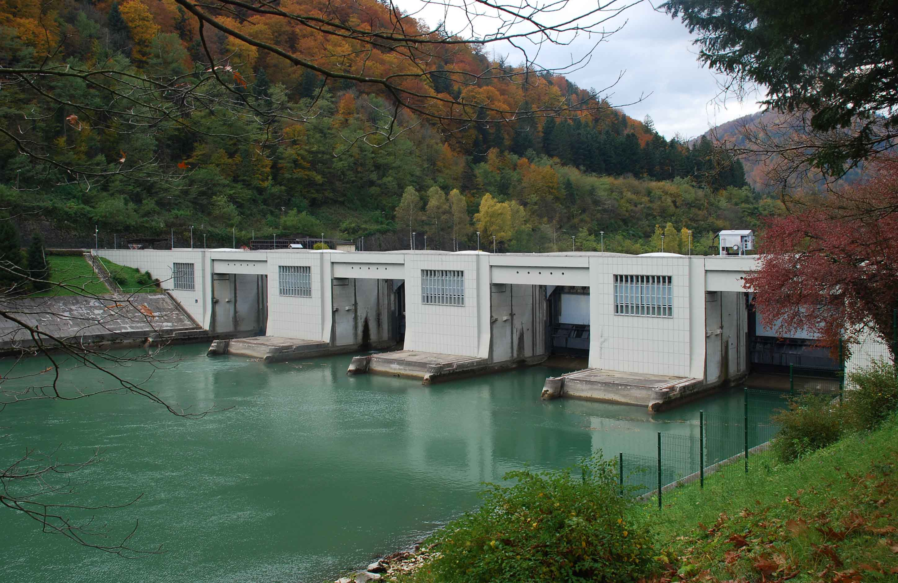 Kraftwerk Ožbalt (St. Oswald im Drauwald, St. Oswald an der Drau), Slowenien